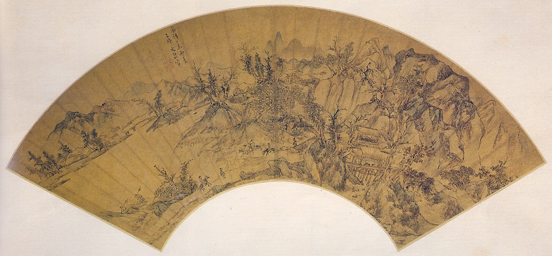 Paysage. Eventail. Couleurs sur papier d'or. H: 18cm; L: 50cm. Par le peintre chinois Wen Boren (1502-1575 ou 1588). Musée Guimet. Paris.